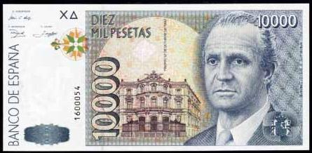 10.000 pesetas del 92.